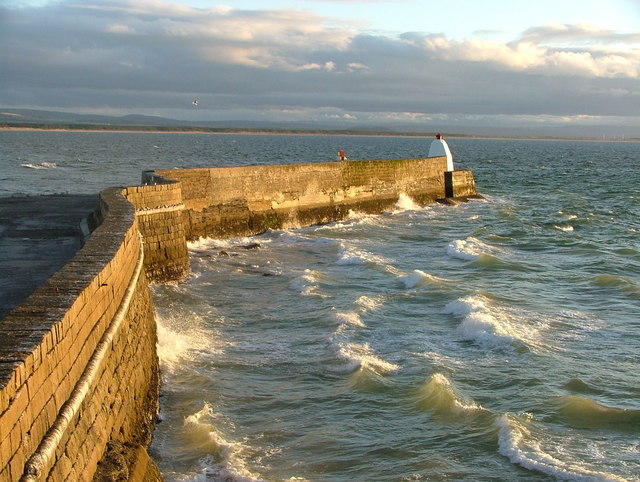 Burghead Pier